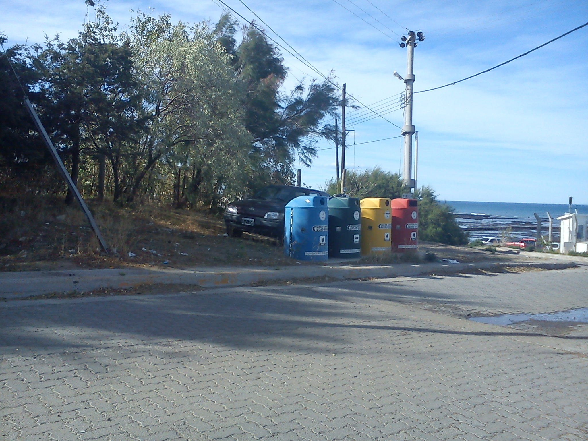 tachos de basura, notese los distintos colores que poseen por fuera segun su clasificacion